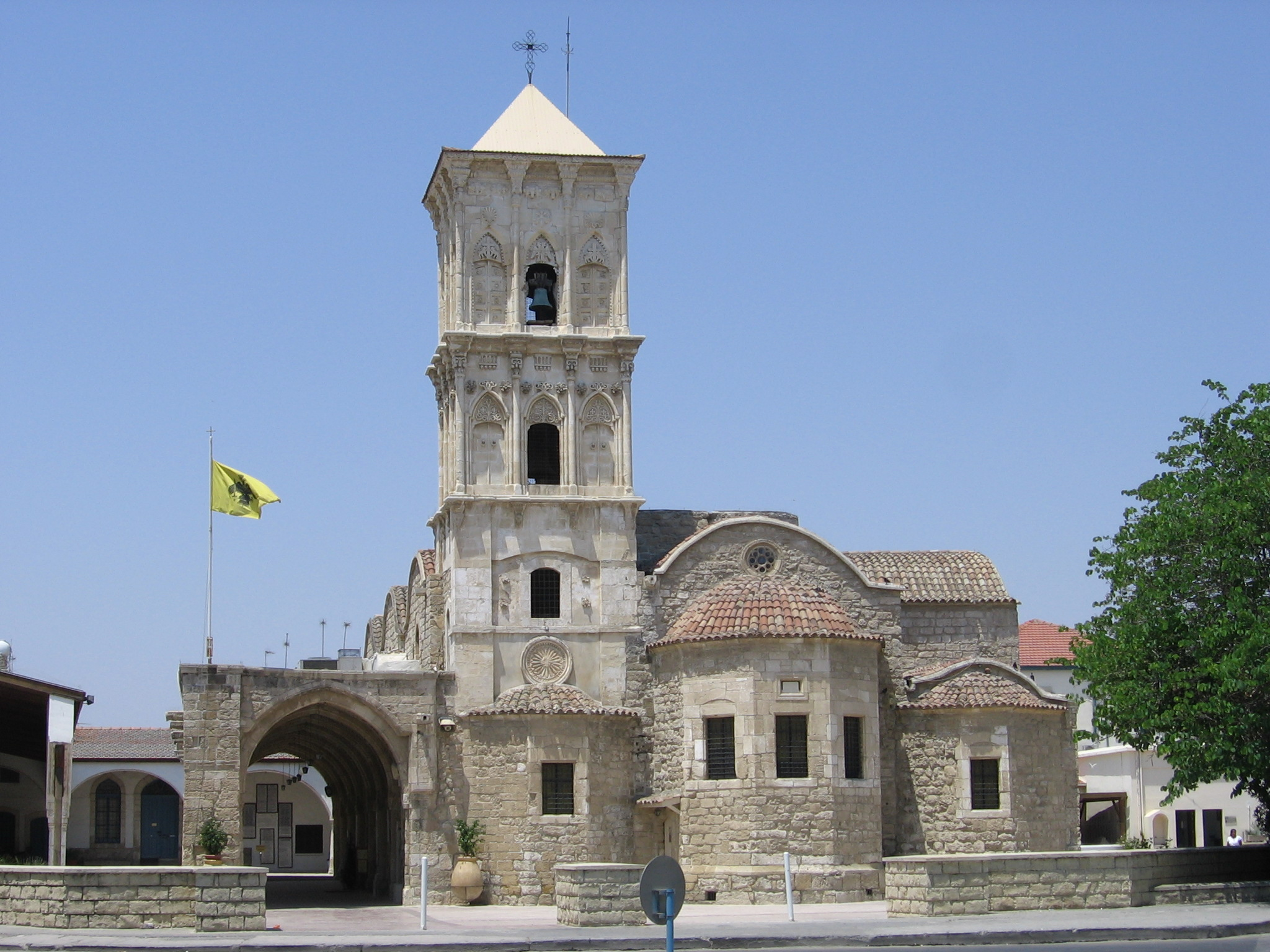 St. Lazarus Church in Larnaka, Cyprus